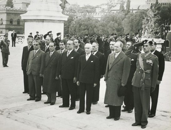 Il presidente del Consiglio Antonio Segni, accompagnato da un gruppo di politici, rende omaggio alla tomba del Milite Ignoto al Vittoriano